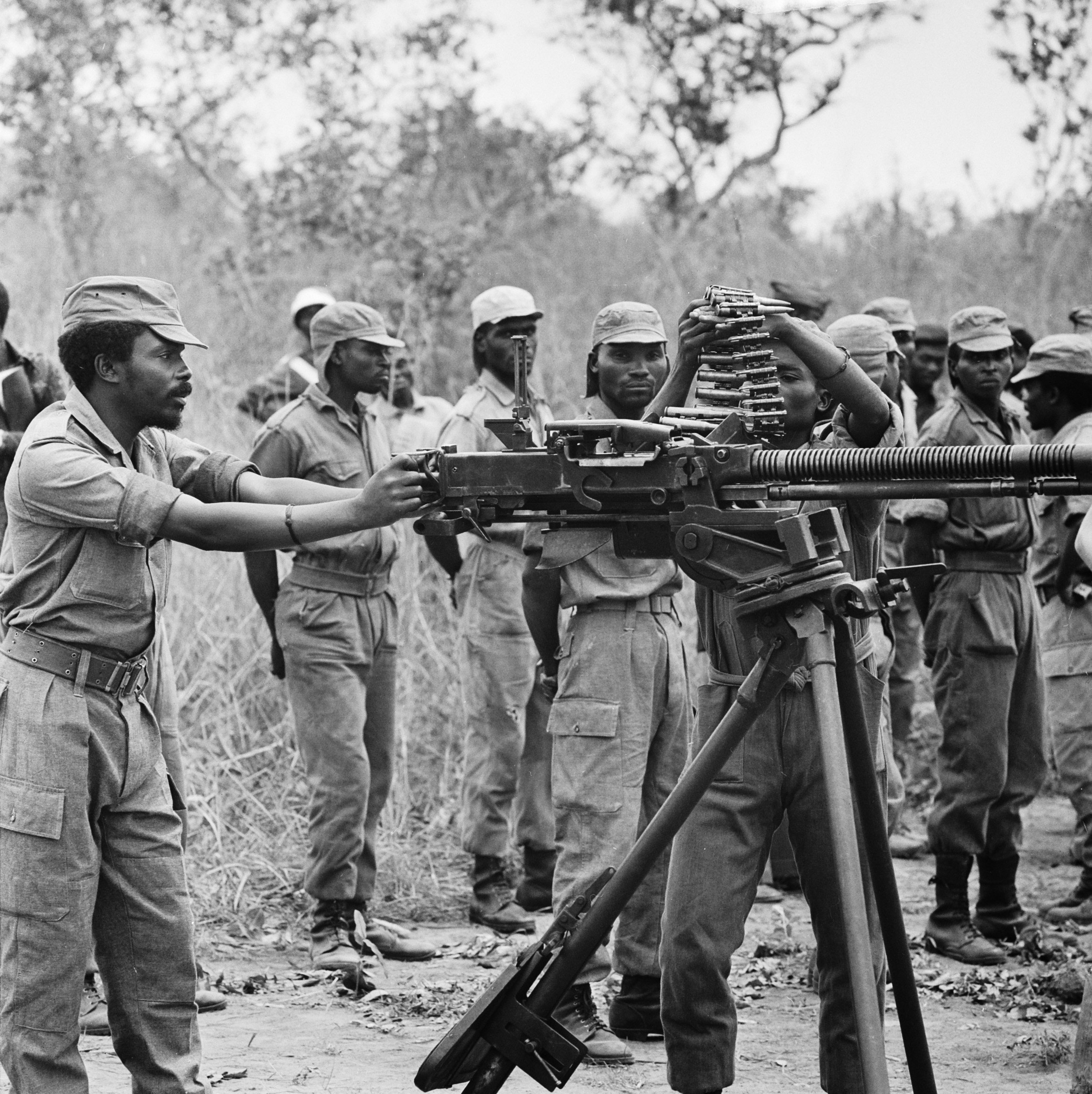 Kamp van Angolese Bevrijdingsbeweging FNLA in Zaire, leden van de bevrijdingsbeweging met wapens Datum 22 augustus 1973